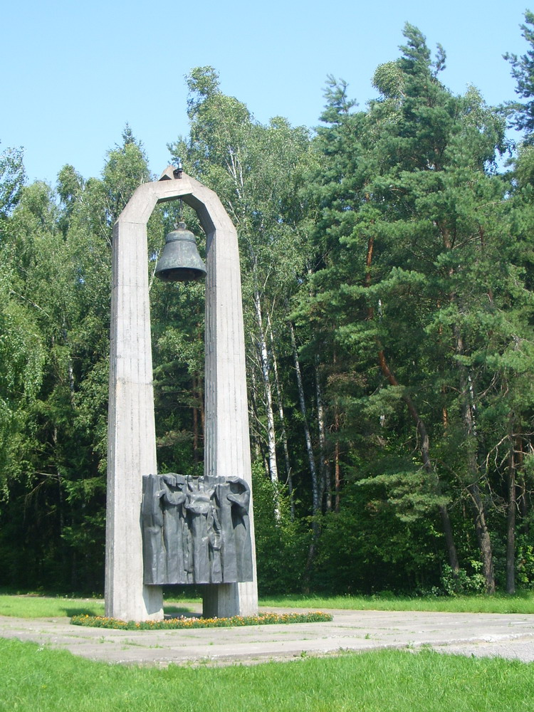 Беларуская (тарашкевіца): Мэмарыяльны комплекс «Урочышча Гай». г. Баранавічы This is a photo of Belarusian heritage monument. Reference number: 113Д000050 ( WLM)